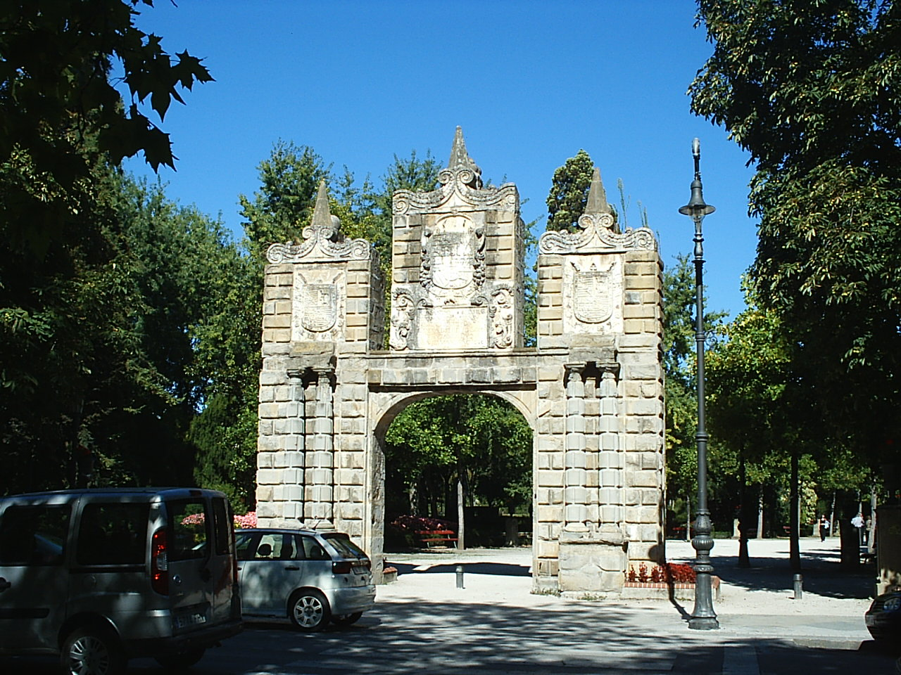 Jardines de La Taconera. Puerta de San Nicolás.